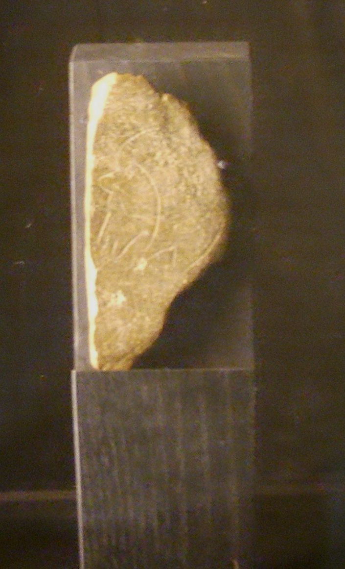 Museo fiorentino di Preistoria in Florence, italy